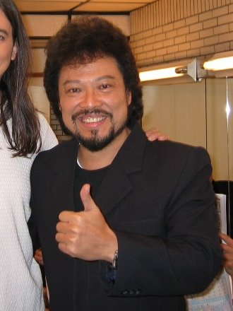 中國電視公司綜藝節目《綜藝大哥大》主持人張菲。